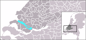 Kaart van het Haringvliet, gemaakt uit sjabloon van Wikipedia-gebruiker Mtcv